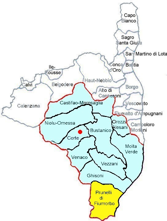 Localisation du canton de Prunelli-di-Fiumorbo, Fiumorbu, Cursa, Haute-Corse